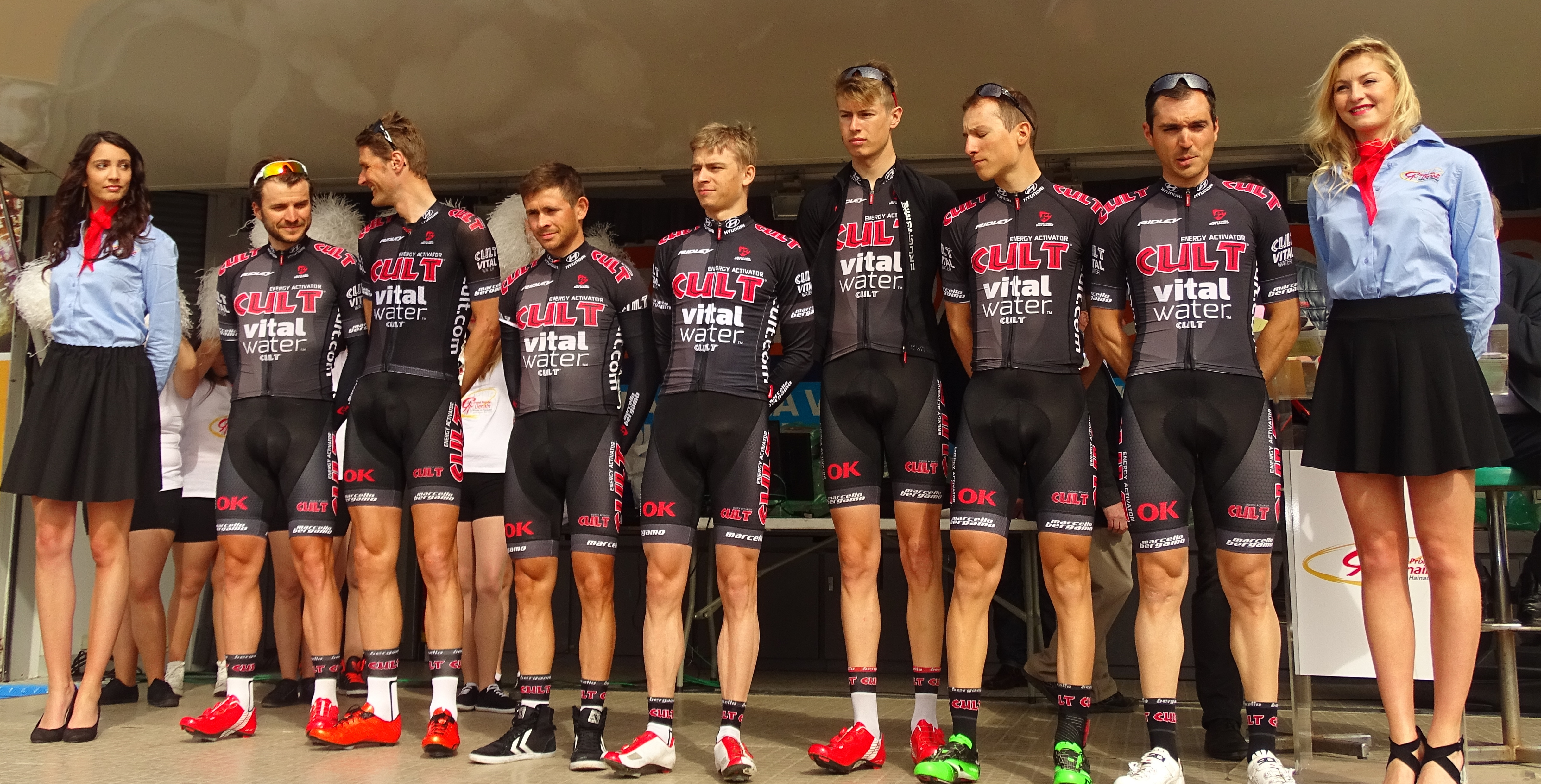 Reportage réalisé le jeudi 16 avril à l'occasion du départ et de l'arrivée du Grand Prix de Denain 2015 à Denain, Nord, Nord-Pas-de-Calais, France.